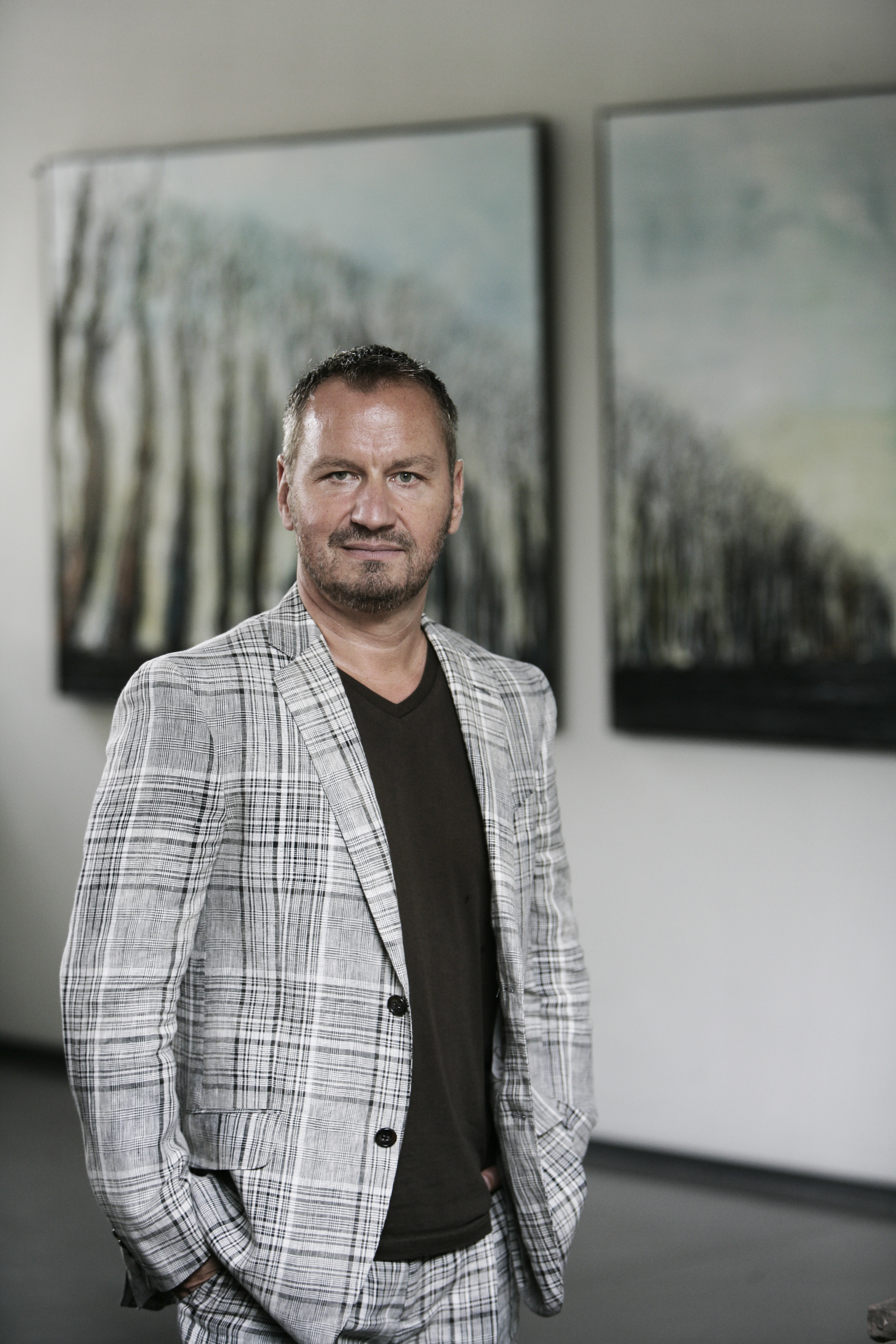 Portrait des deutschen Künstlers Dietmar Brixy